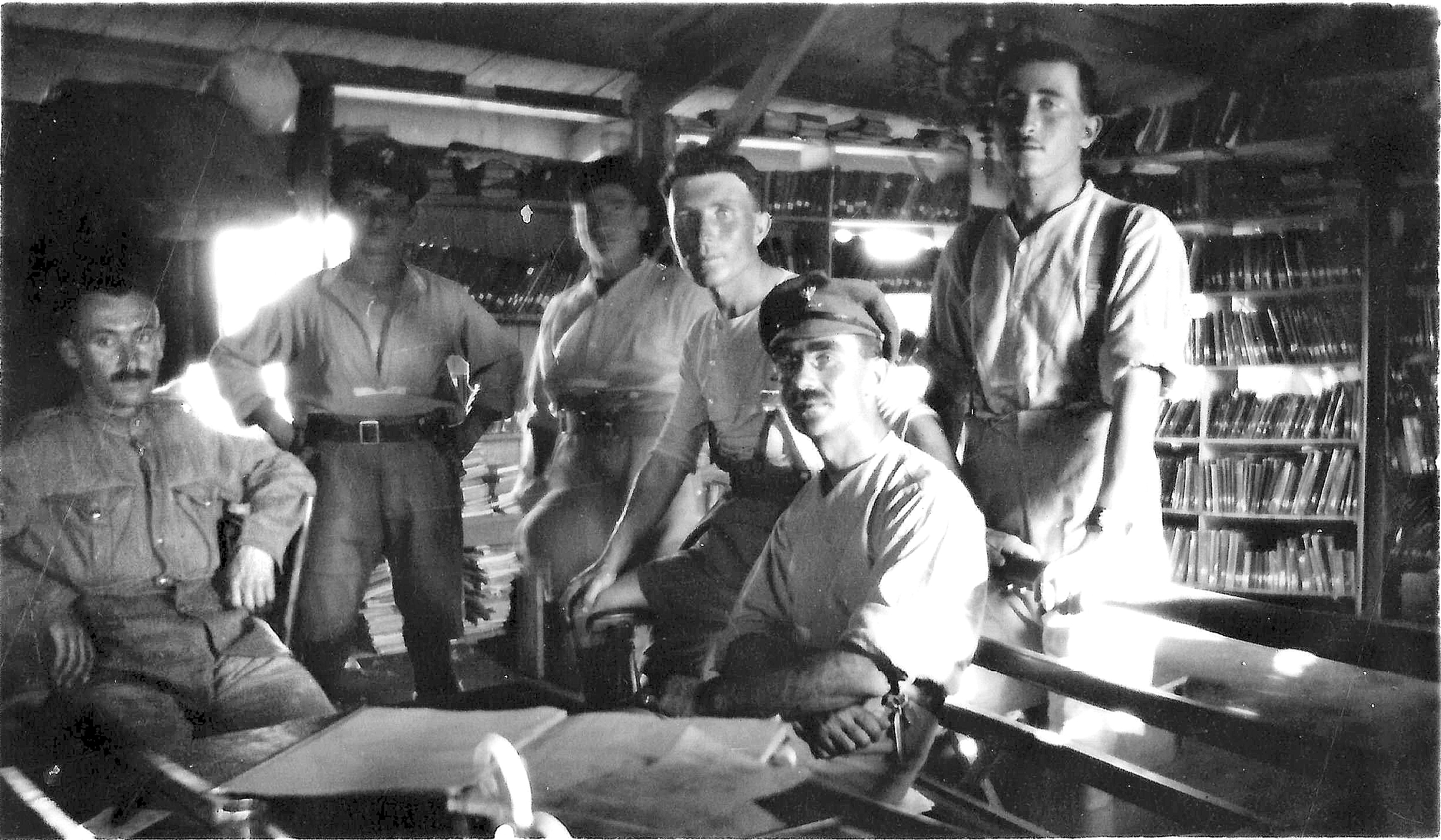 אלכסנדר איג עם חבריו בגדודים העבריים, בספריה שהקים עם אליעזר פקטורי